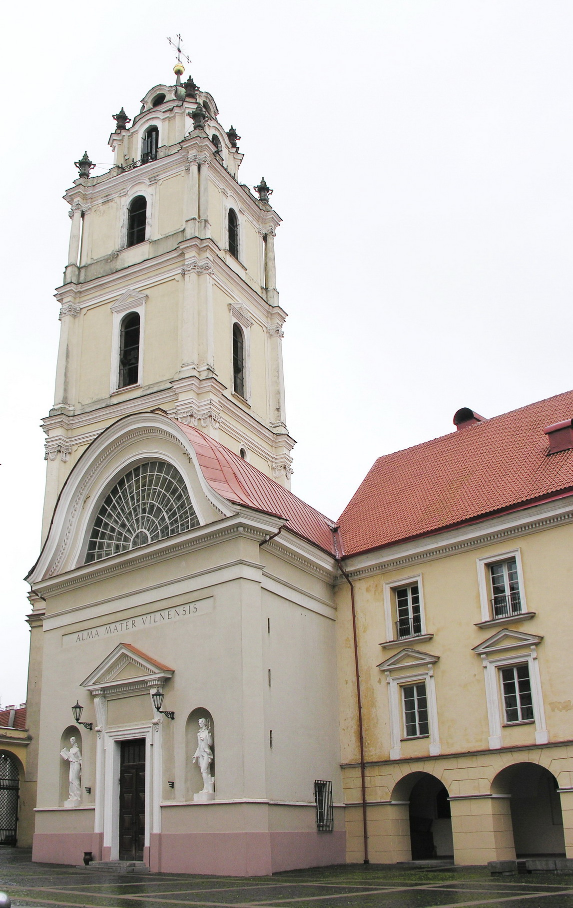 Vilniaus universitetas Šv. Jono bažnyčios varpinė Foto: Algirdas, 2006 m. rugpjūčio 8 d., Lietuva